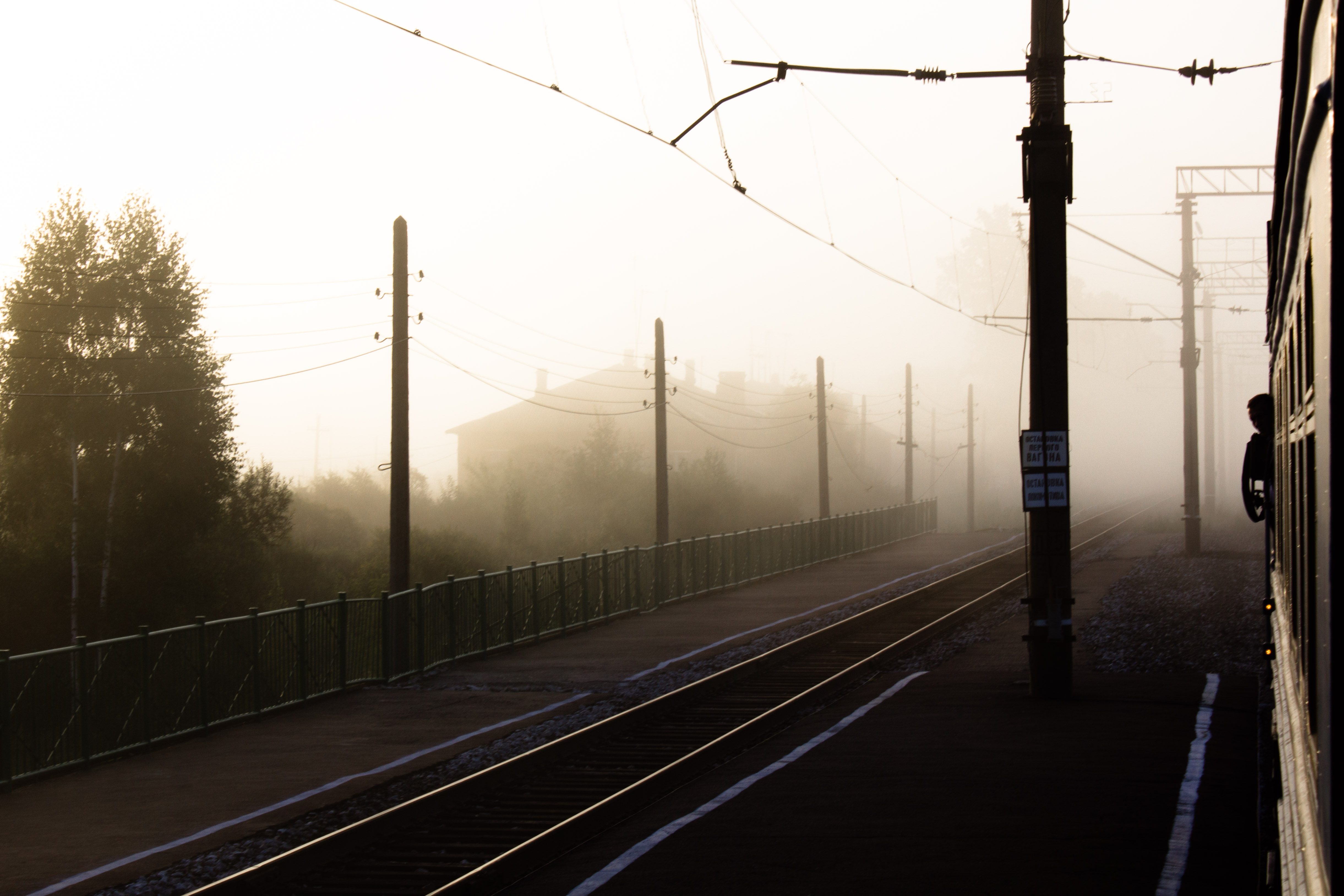 Станция Мыски (08.2011)